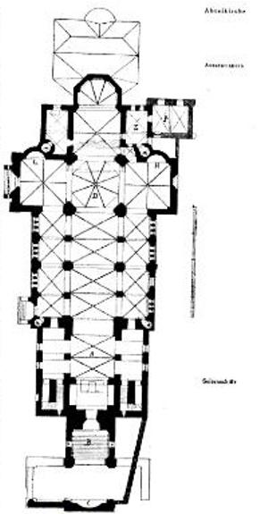 Grundriss der Abteikirche St. Ludgerus Essen-Werden